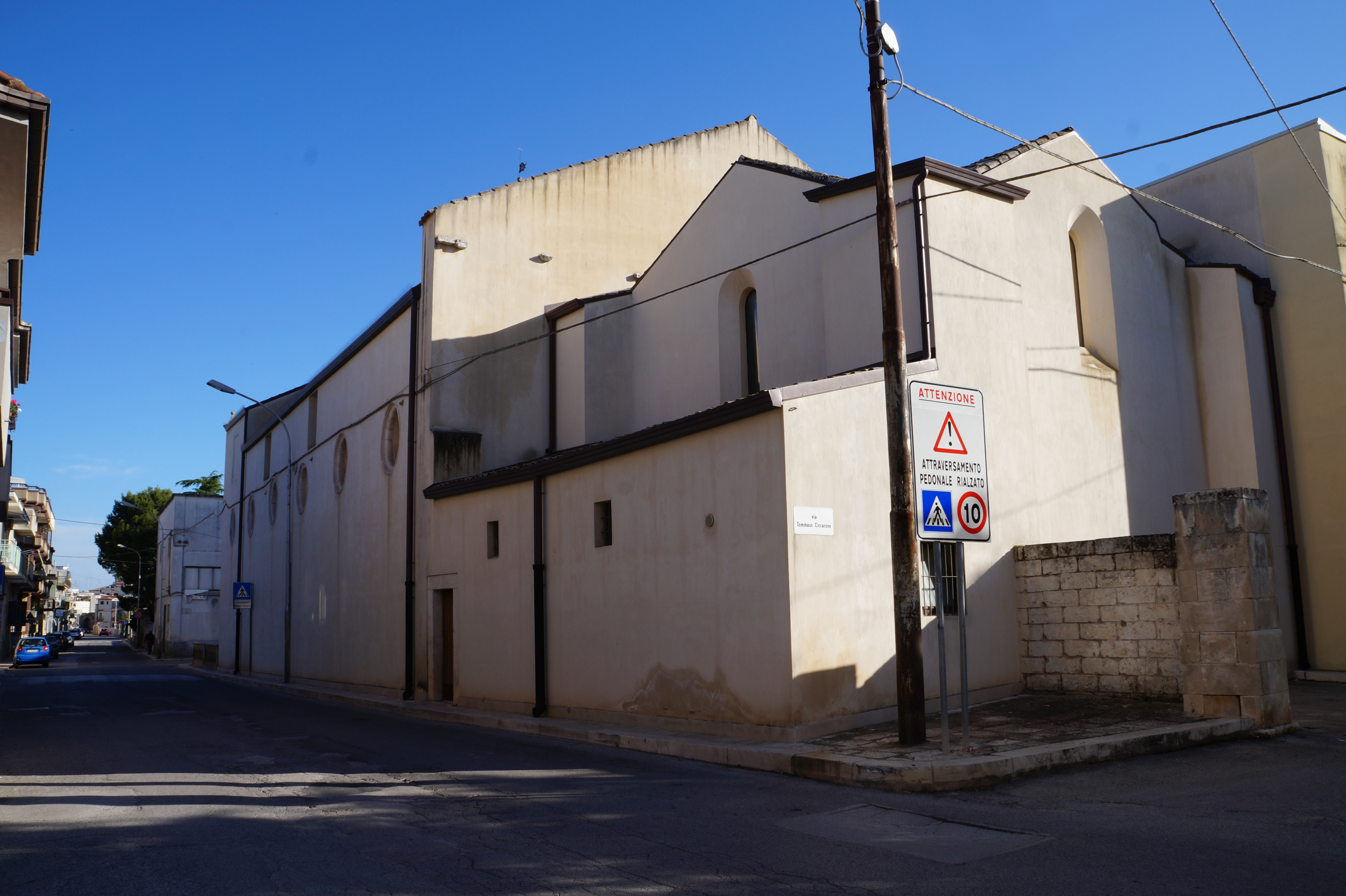 Esterno del presbiterio della chiesa di Santa Maria Maggiore, in Acquaviva delle Fonti.